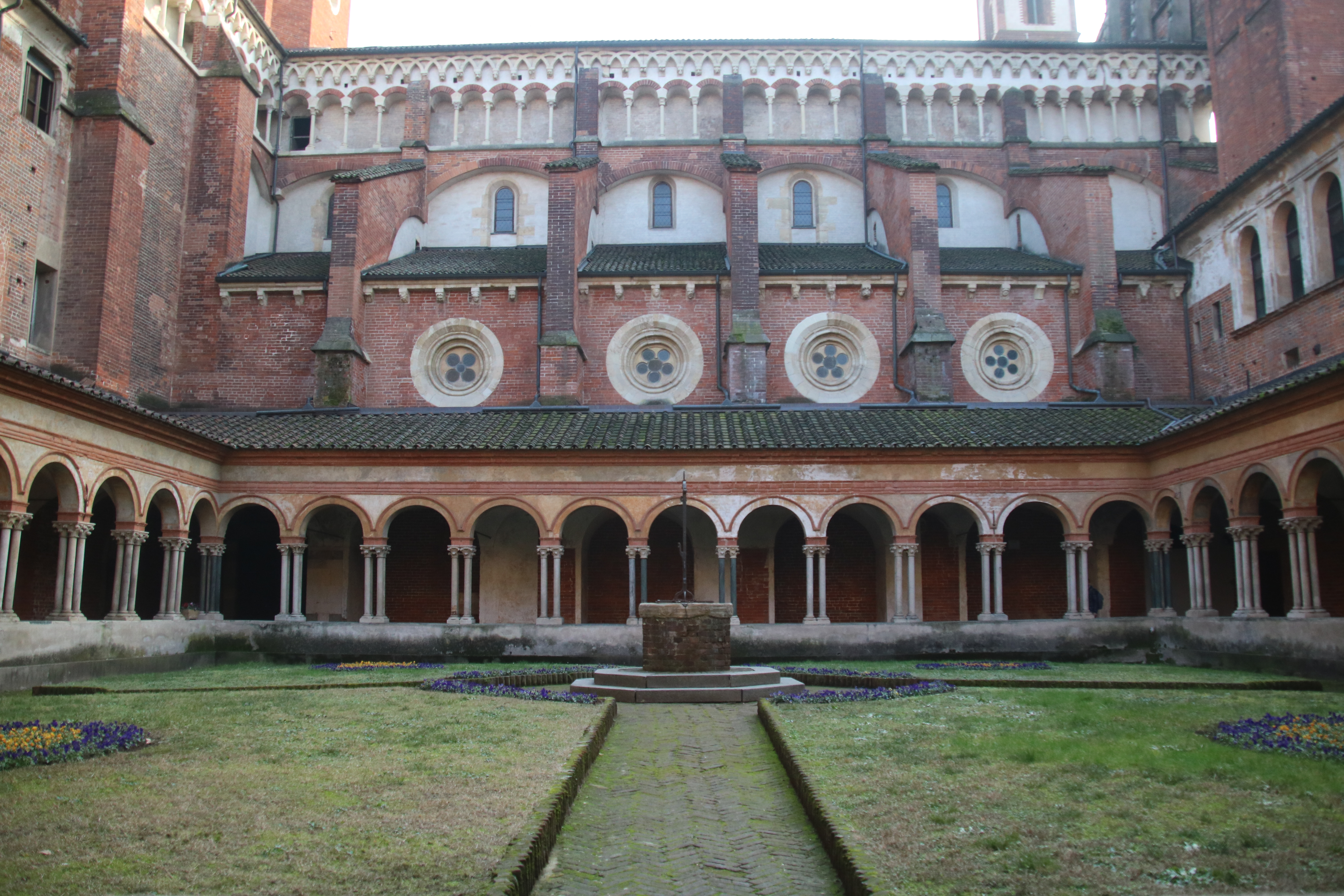 chiostro di Sant'Andrea This is a photo of a monument which is part of cultural heritage of Italy.